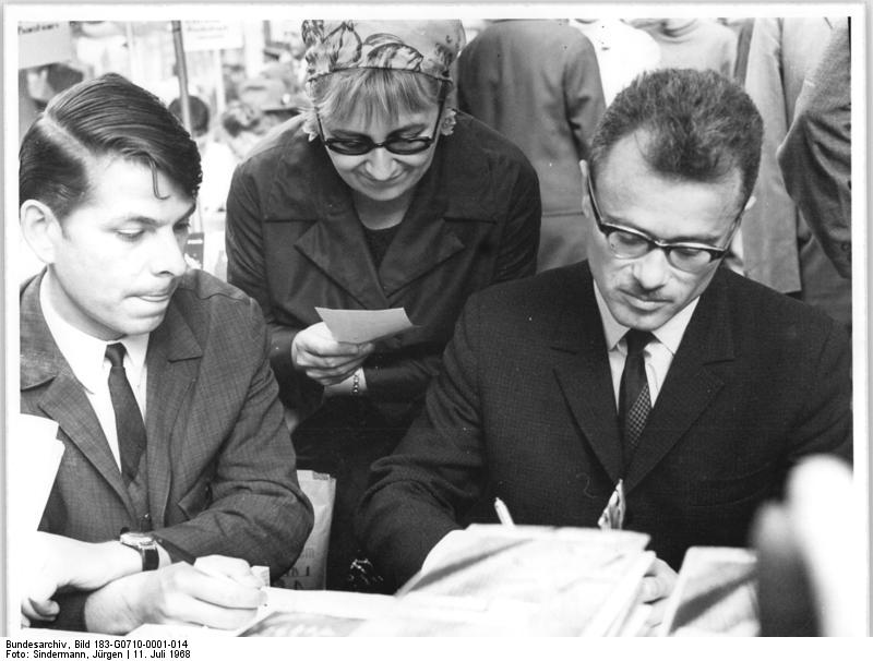 Zentralbild Sindermann 11.7.1968 Ostseewoche 1968 Rostock: Schriftsteller-Autogramme sehr gefragt Beim Buchbasar mußte auch der litauische Schriftsteller Icchokas Meras (rechts) ein Autogramm nach dem anderen geben.